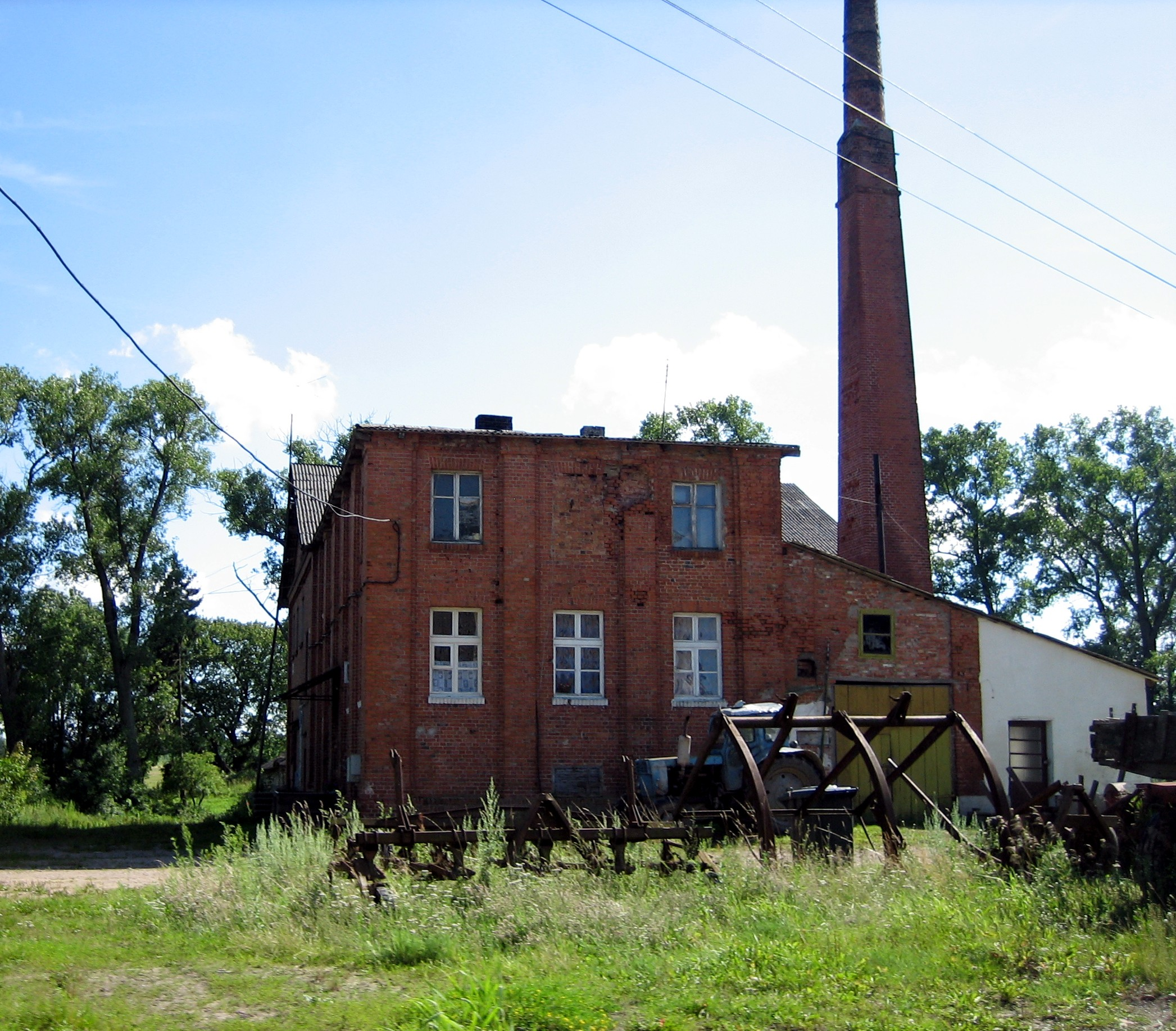 Šereitlaukio dvaro spirito varykla